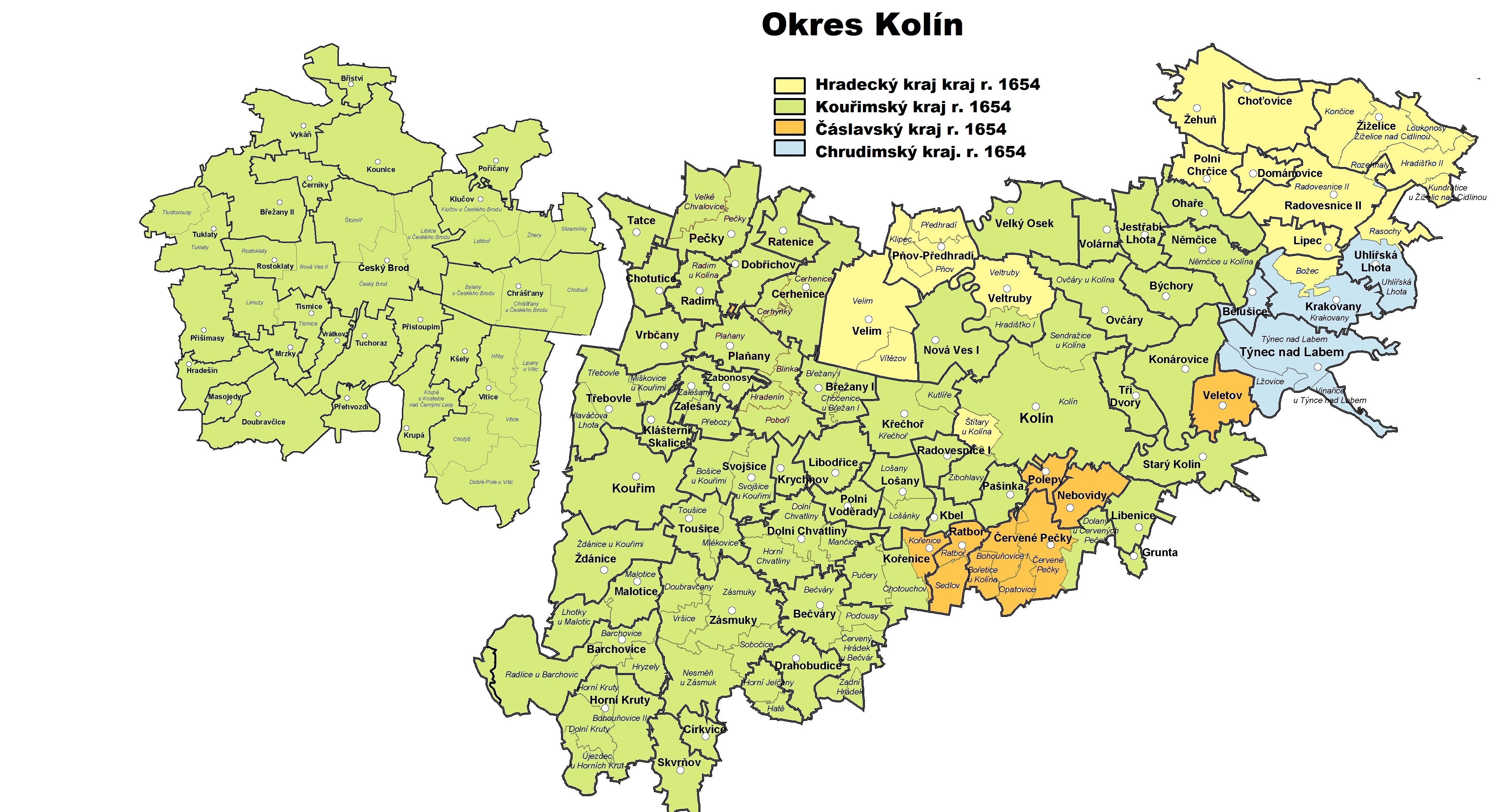 Čáslavský kraj r. 1654 v dnešním okrese Kolín